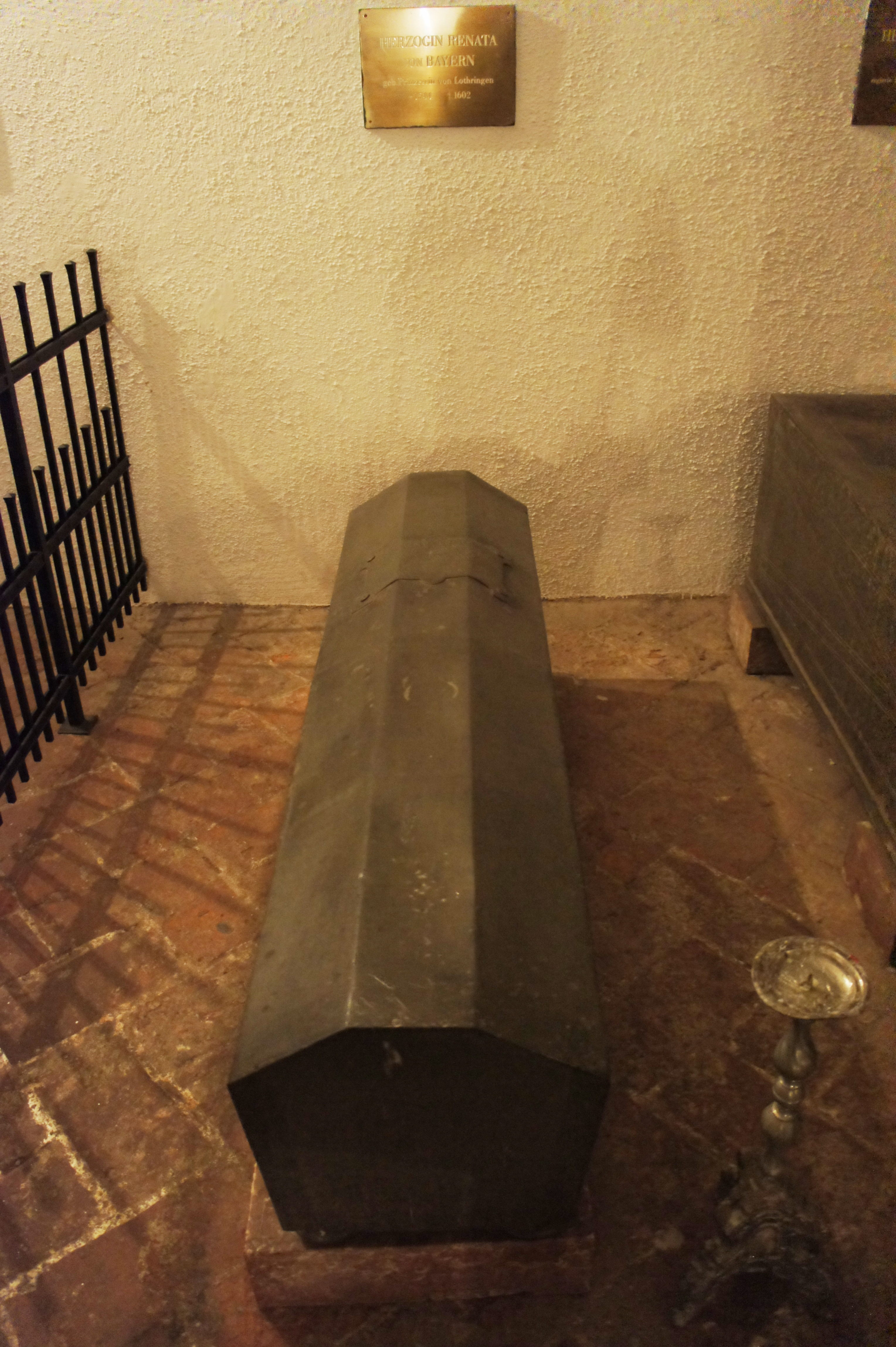 Renata von Lothringen, Herzogin von Bayern (20. April 1544 – 22. Mai 1602) (22. Februar 1568 Gemahlin von Herzog Wilhelm V.). Sarkophag in der Grablege der Wittelsbacher in der St. Michael Kirche in München.